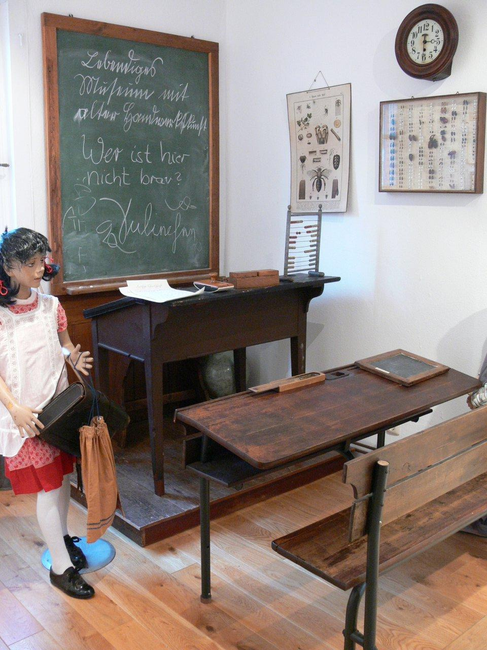 Nachbau eines alten Klassenzimmers, ausgestellt im Heiamtmuseum Seulberg